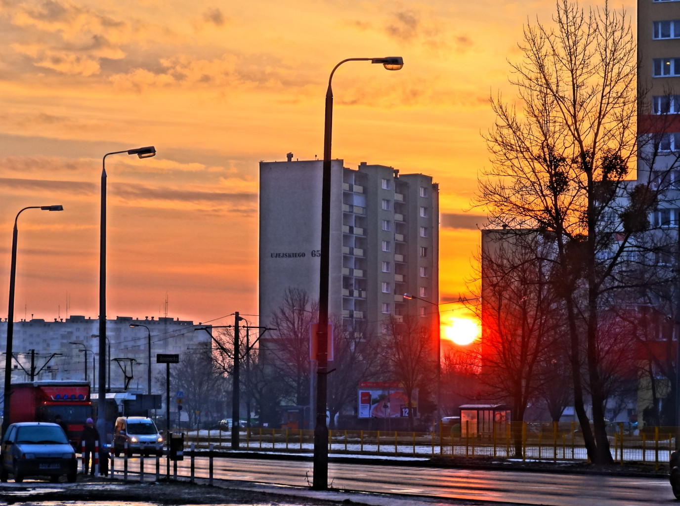 Osiedle Wzgórze Wolności w Bydgoszczy o wschodzie słońca